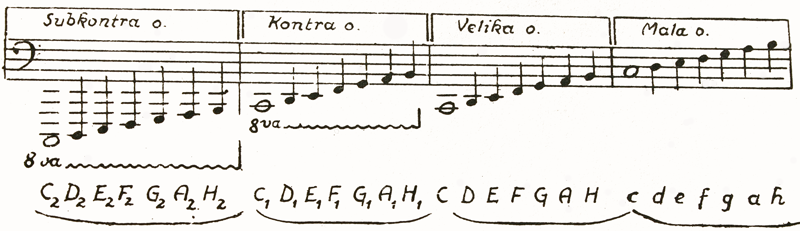 Uporabnik:lanfra